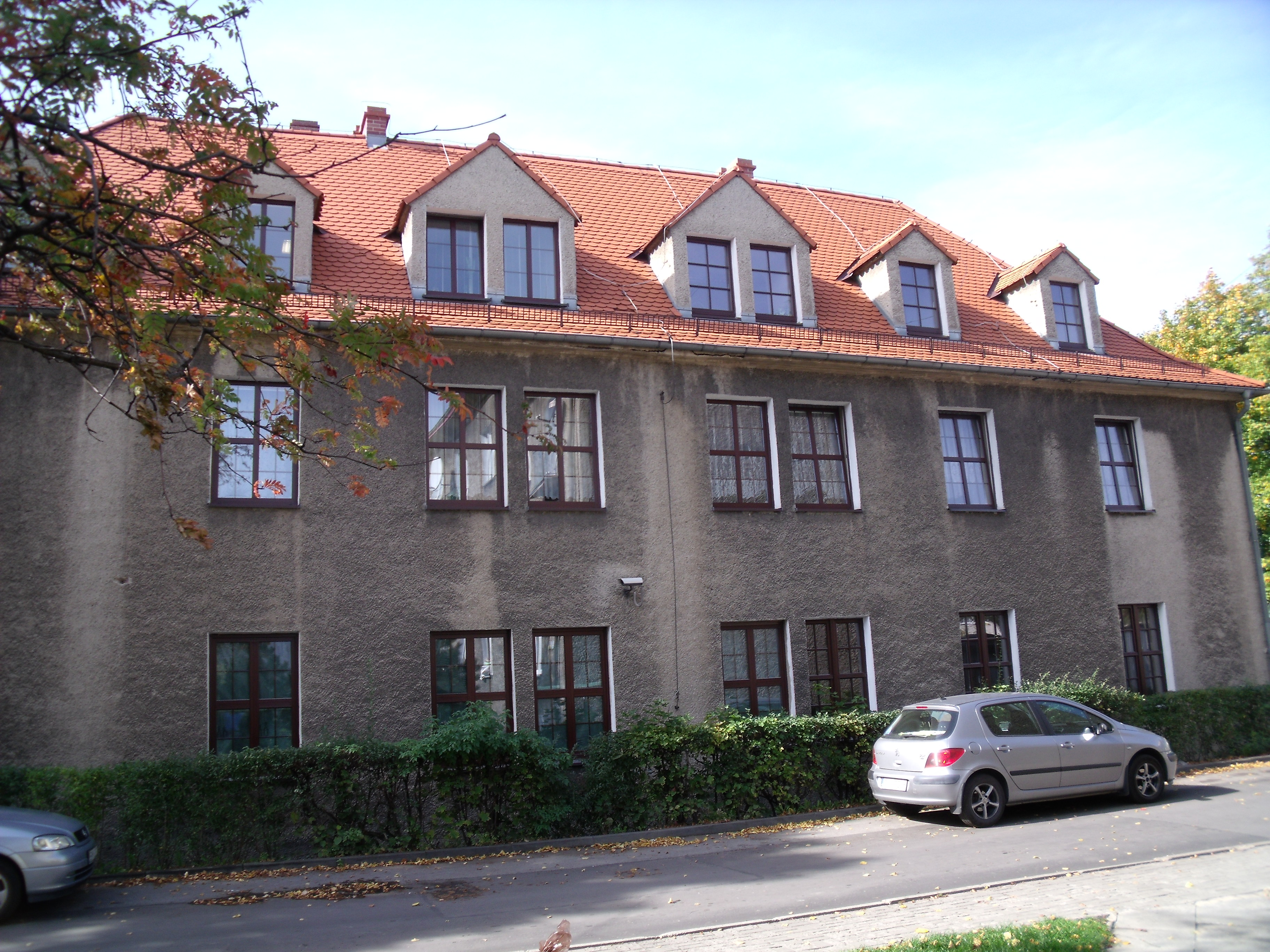 Łaziska Górne - budynek Biblioteki Miejskiej (zabytek nr A 157/05 z 7.10.2005)